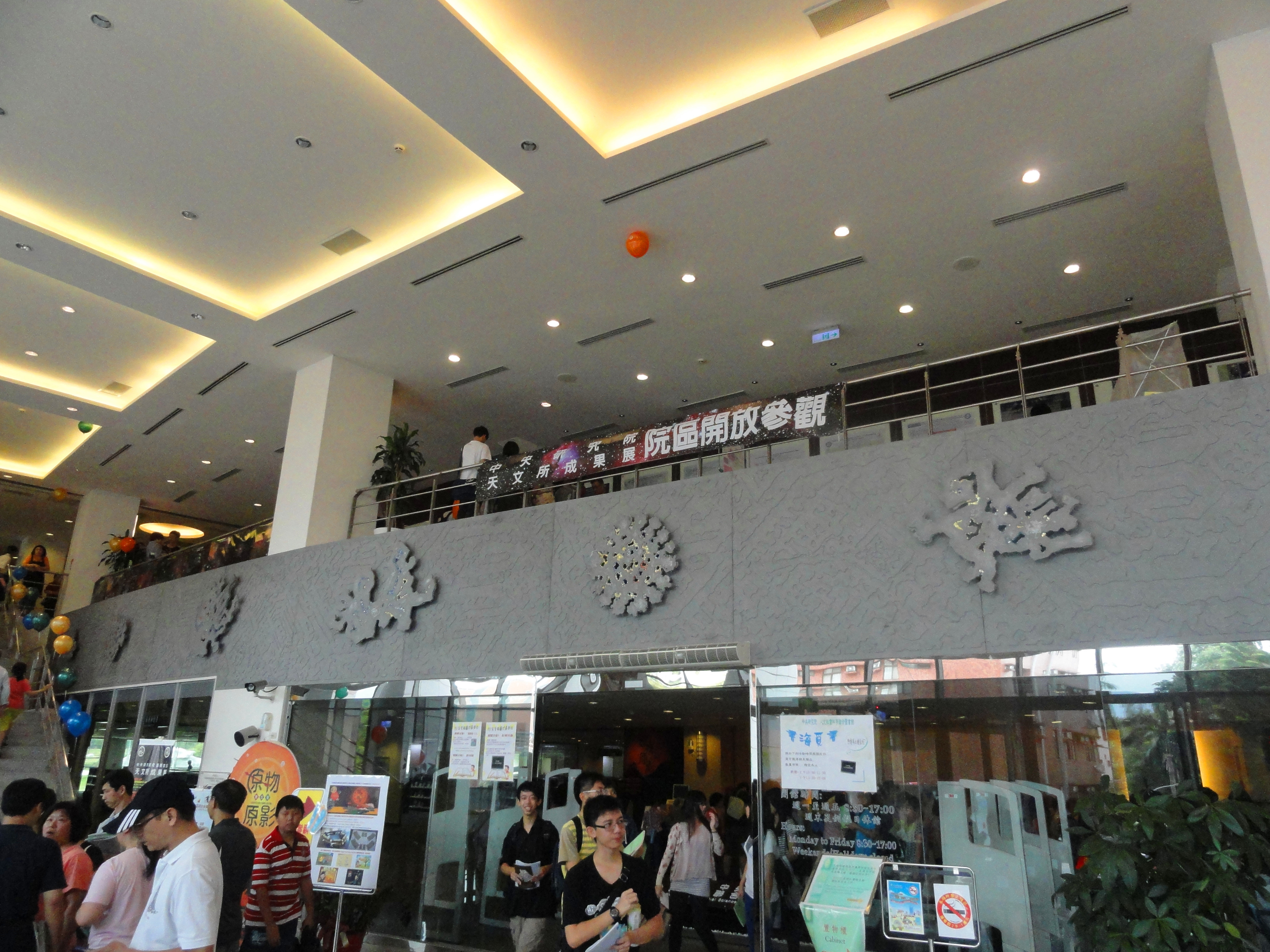 中文（中国大陆）: 2012年中央研究院天文所院区开放日